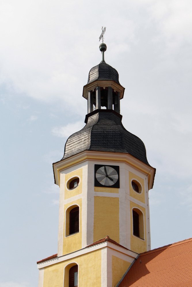 Kirche in Kayna, Zeitz, Burgenlandkreis, Sachsen-Anhalt, Deutschland